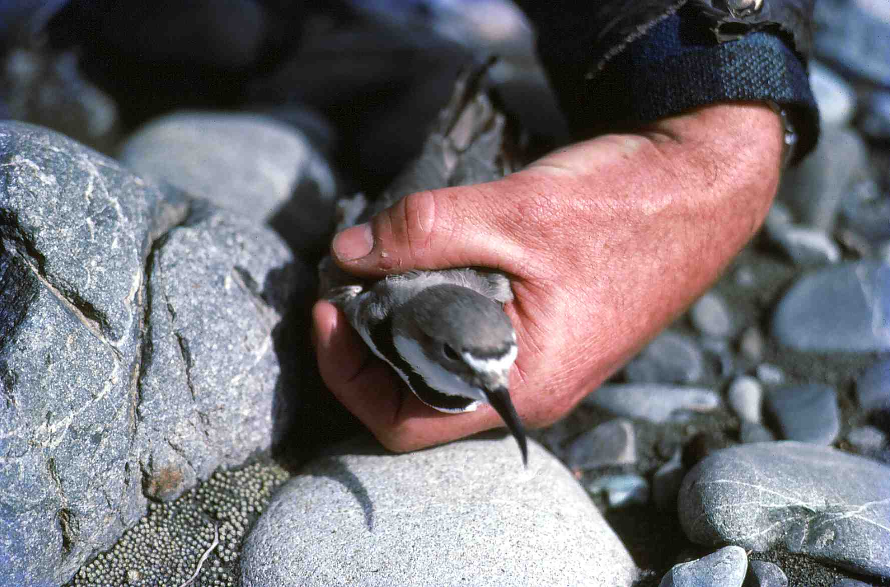 Wrybill